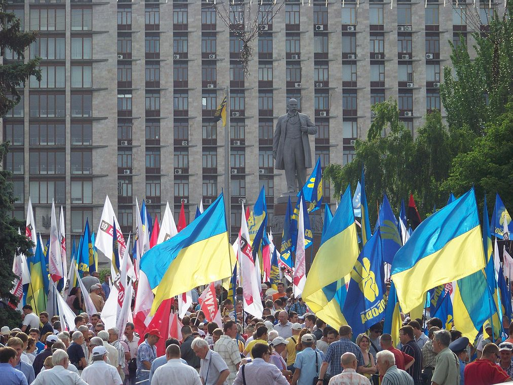 Акація "Вставай, Україно!" в Донецьку.